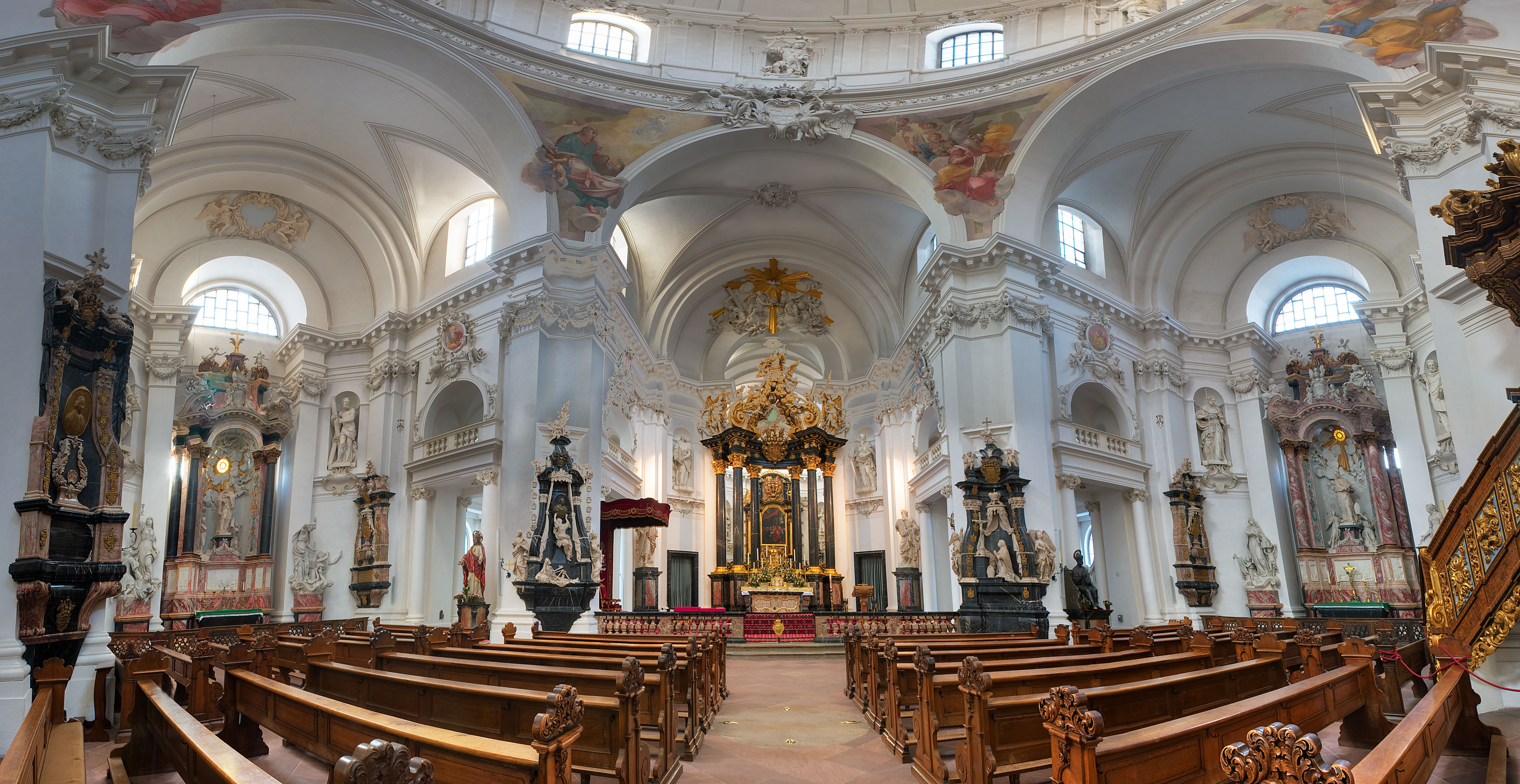 Fuldaer Dom in Fulda